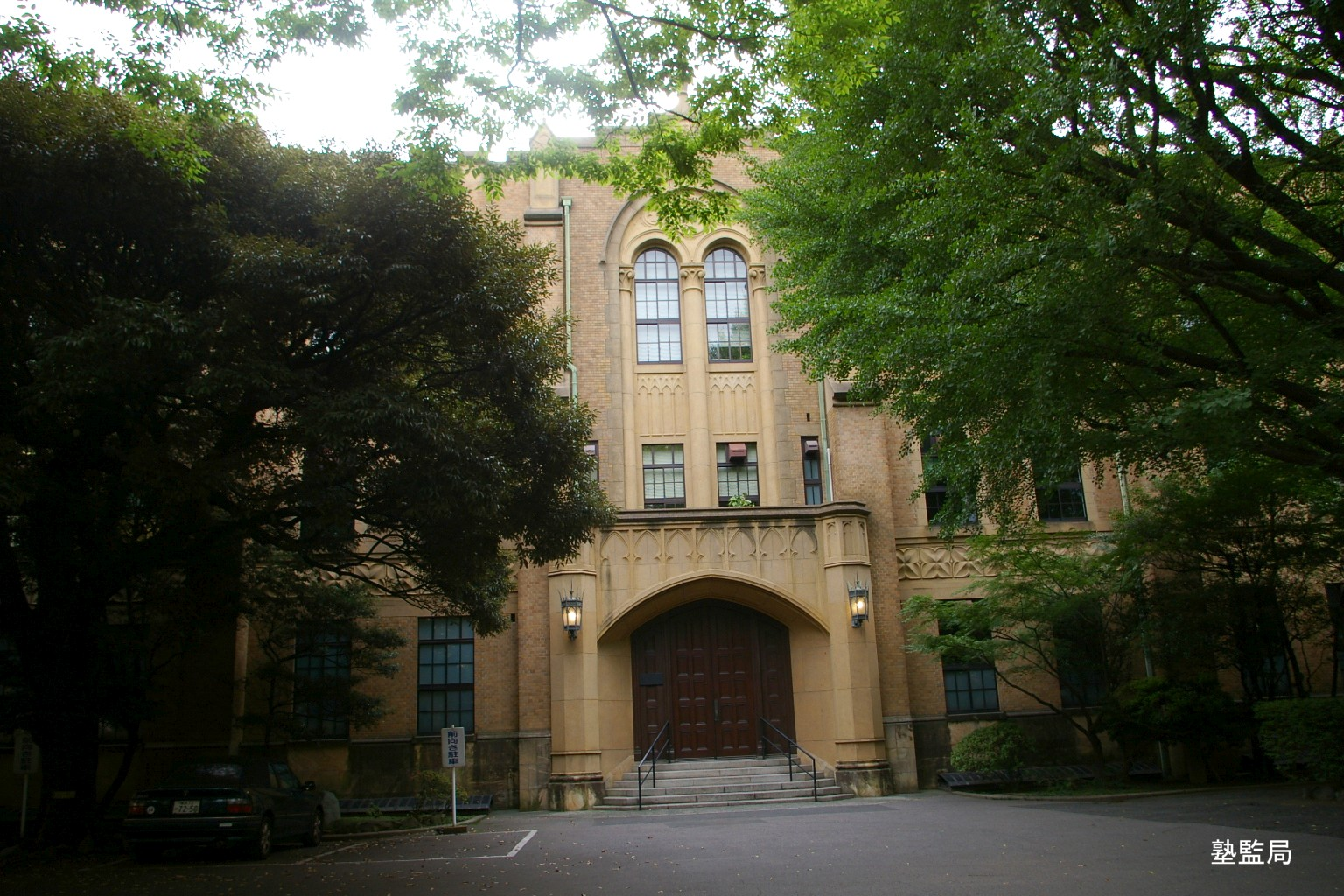 2009.6東京都内で塾生 (talk)が撮影